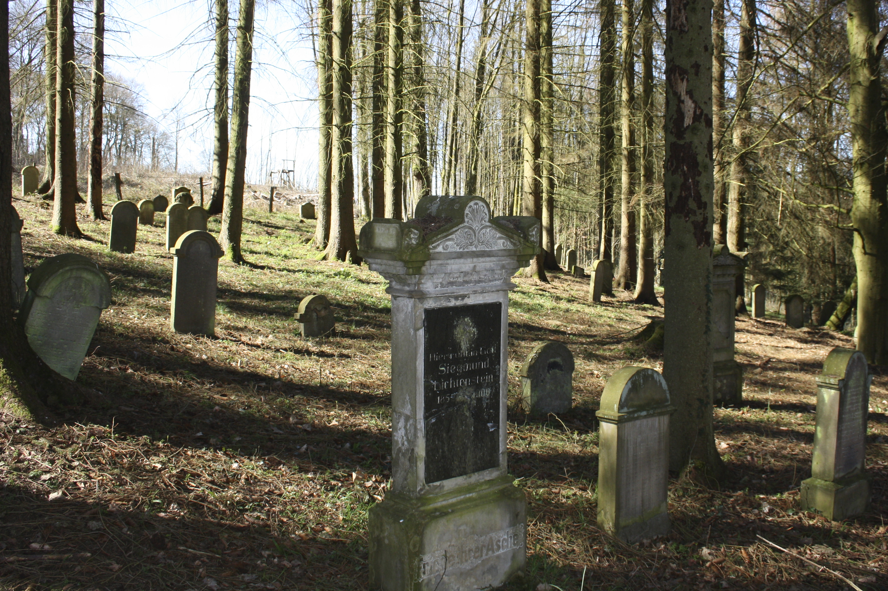 Der jüdische Friedhof in Selters, Westerwaldkreis, Rheinland-Pfalz, Deutschland